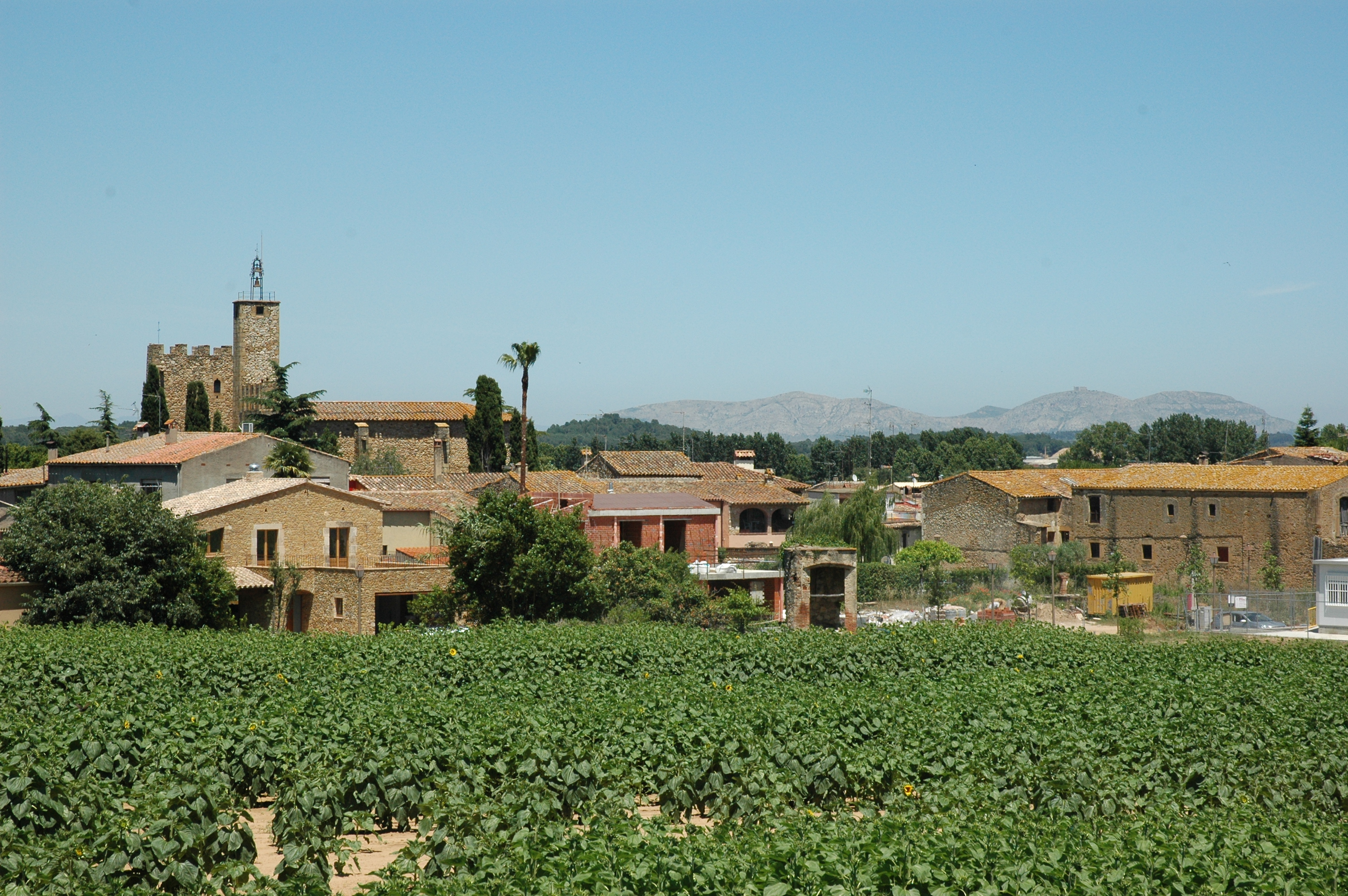 Vulpellac